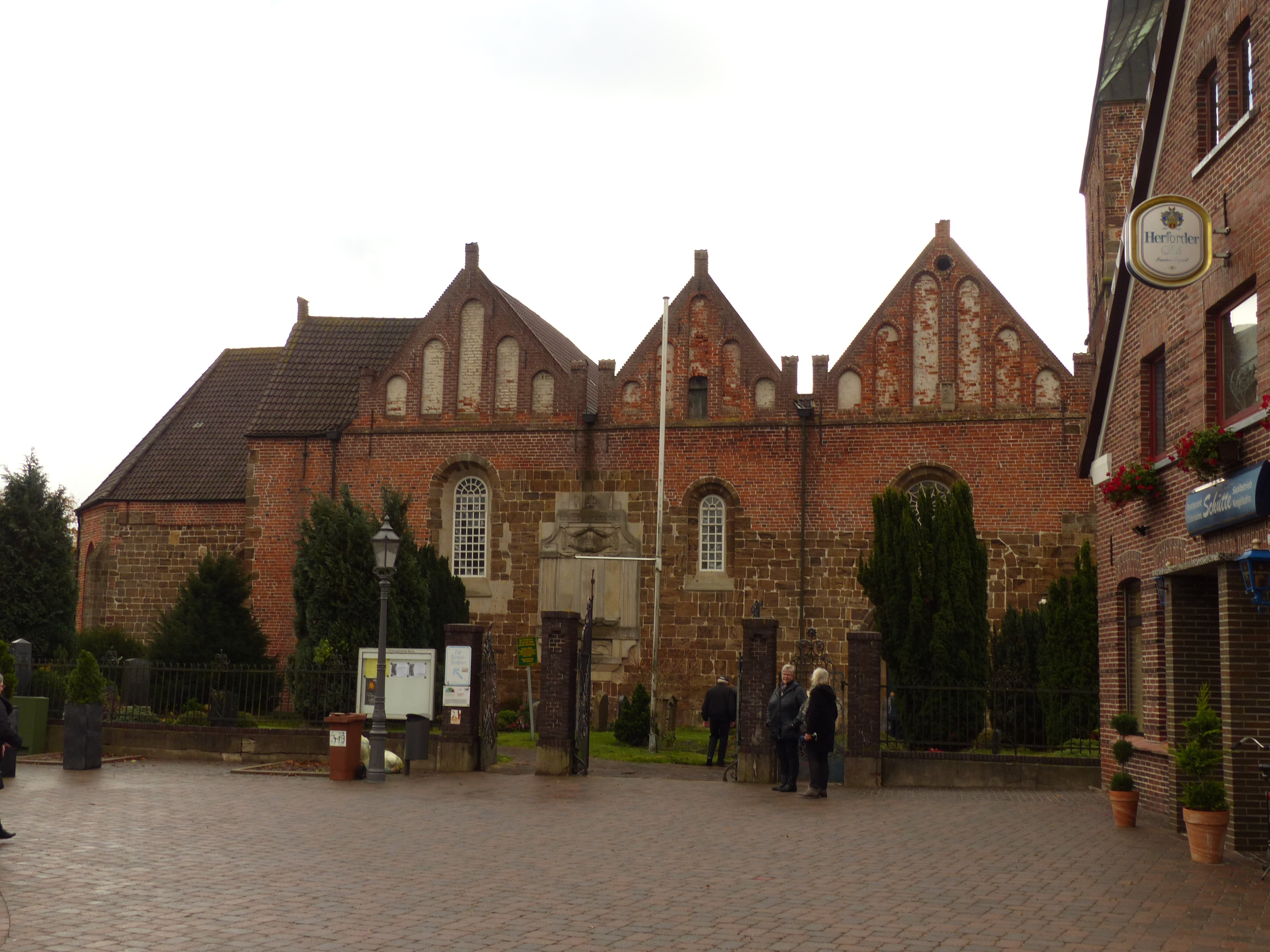 Aegidiuskirche Berne: Schiff und Chor von Norden